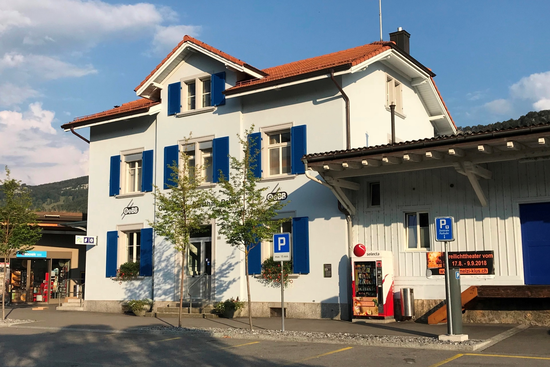 Bahnhofgebäude von Balsthal der Oensingen–Balsthal-Bahn (OeBB) in der Schweiz.